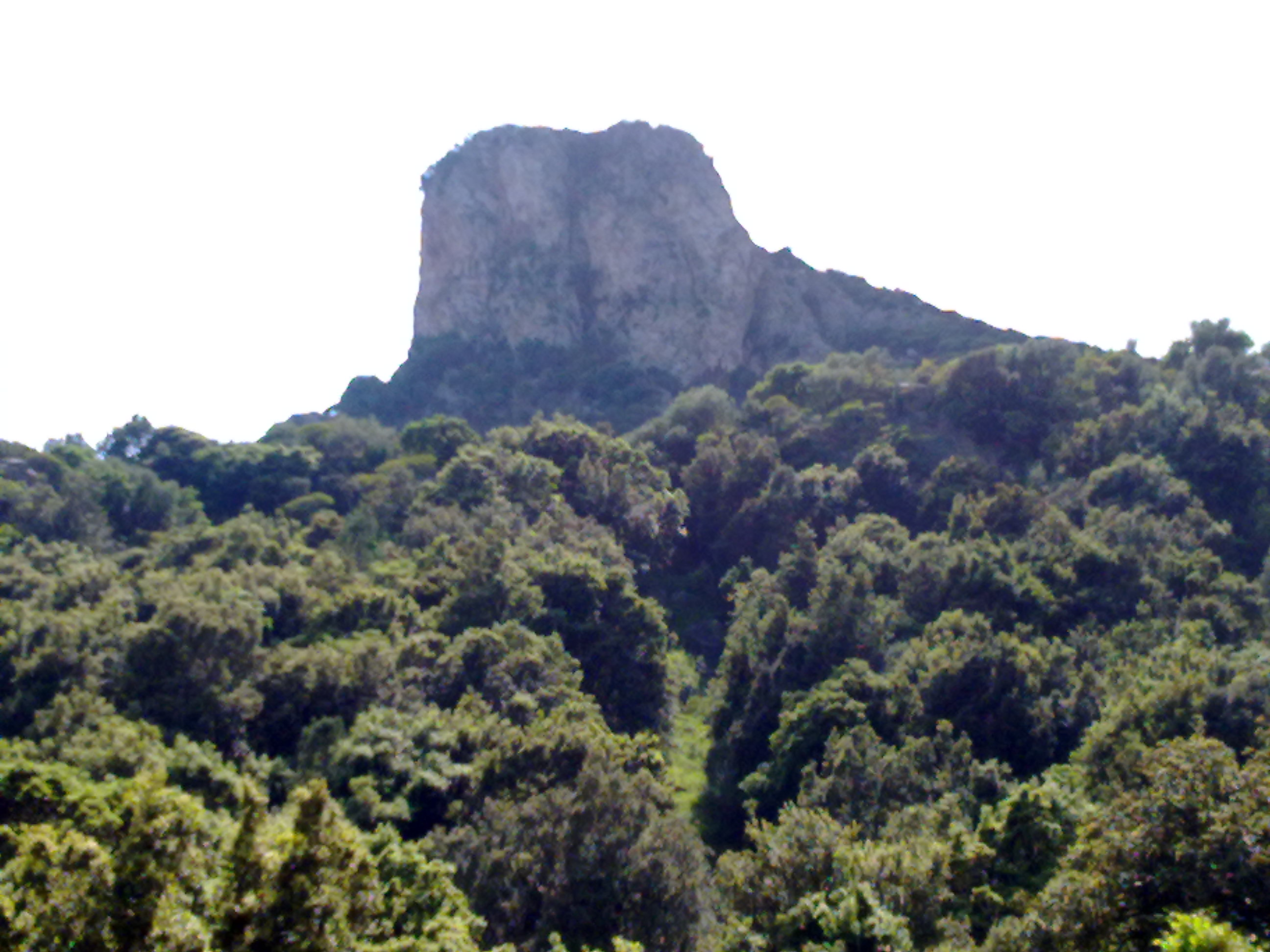 Massiccio Perd'e cerbu Domusnovas